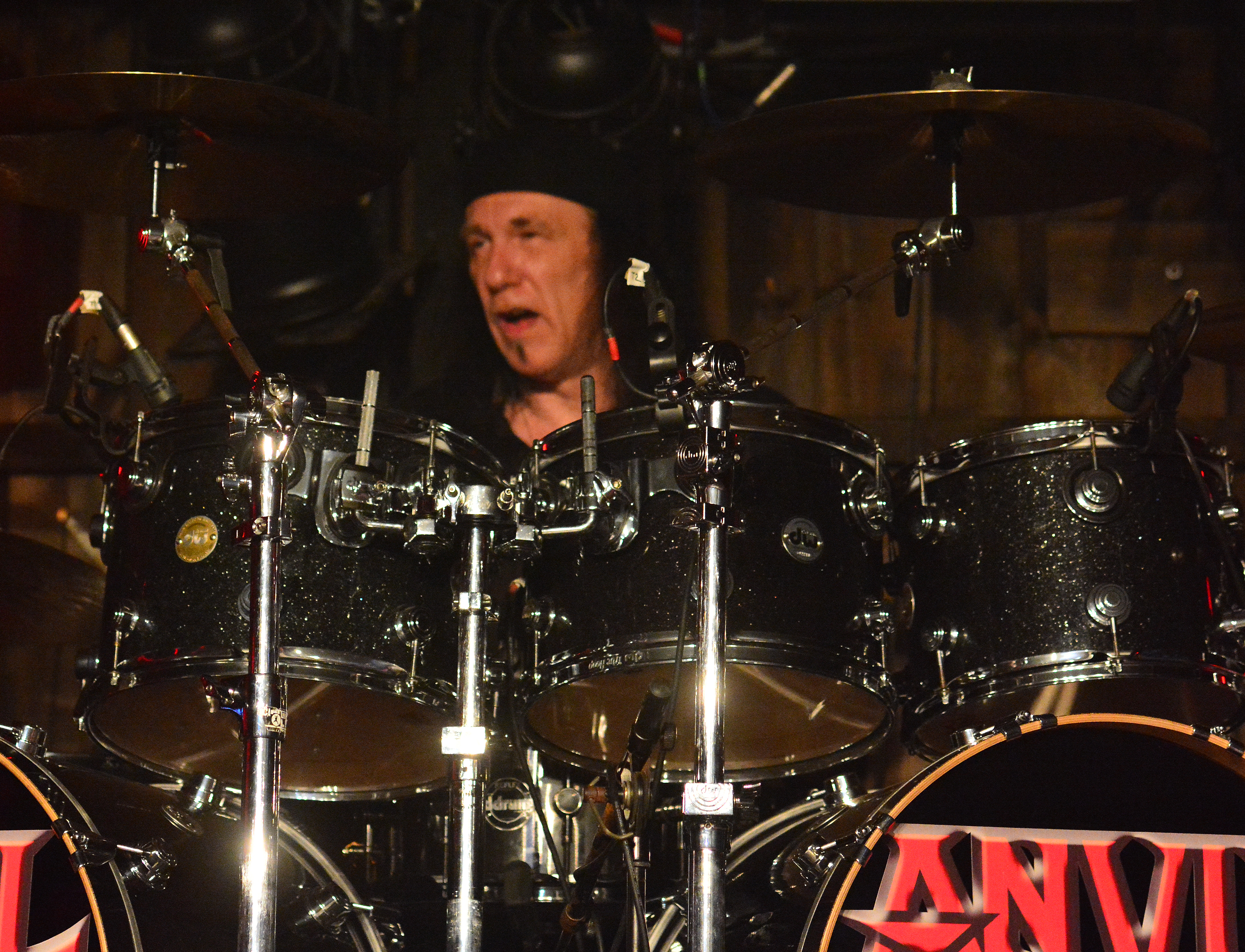 Robb Reiner von Anvil beim Headbangers Open Air 2014